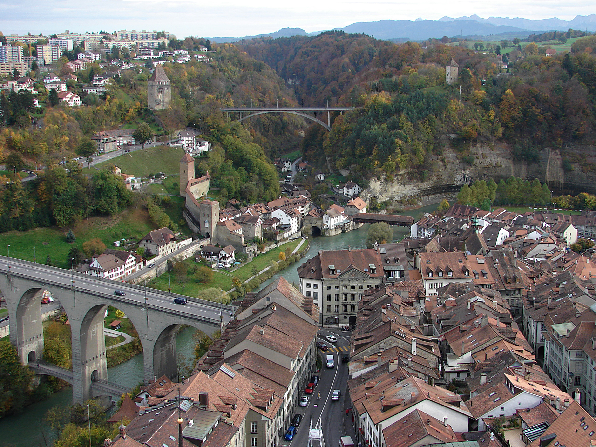 Freiburg mit Senseschlaufe, Galterngraben und Schönberg